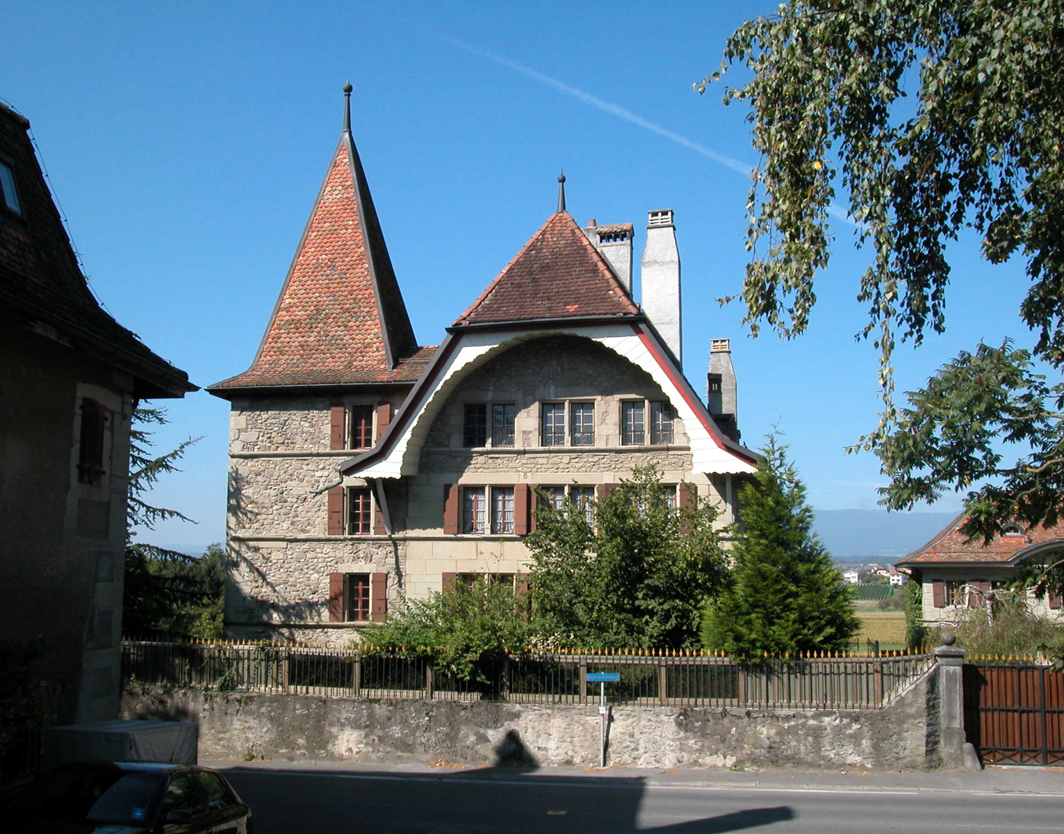 Mex, château d'En-Bas